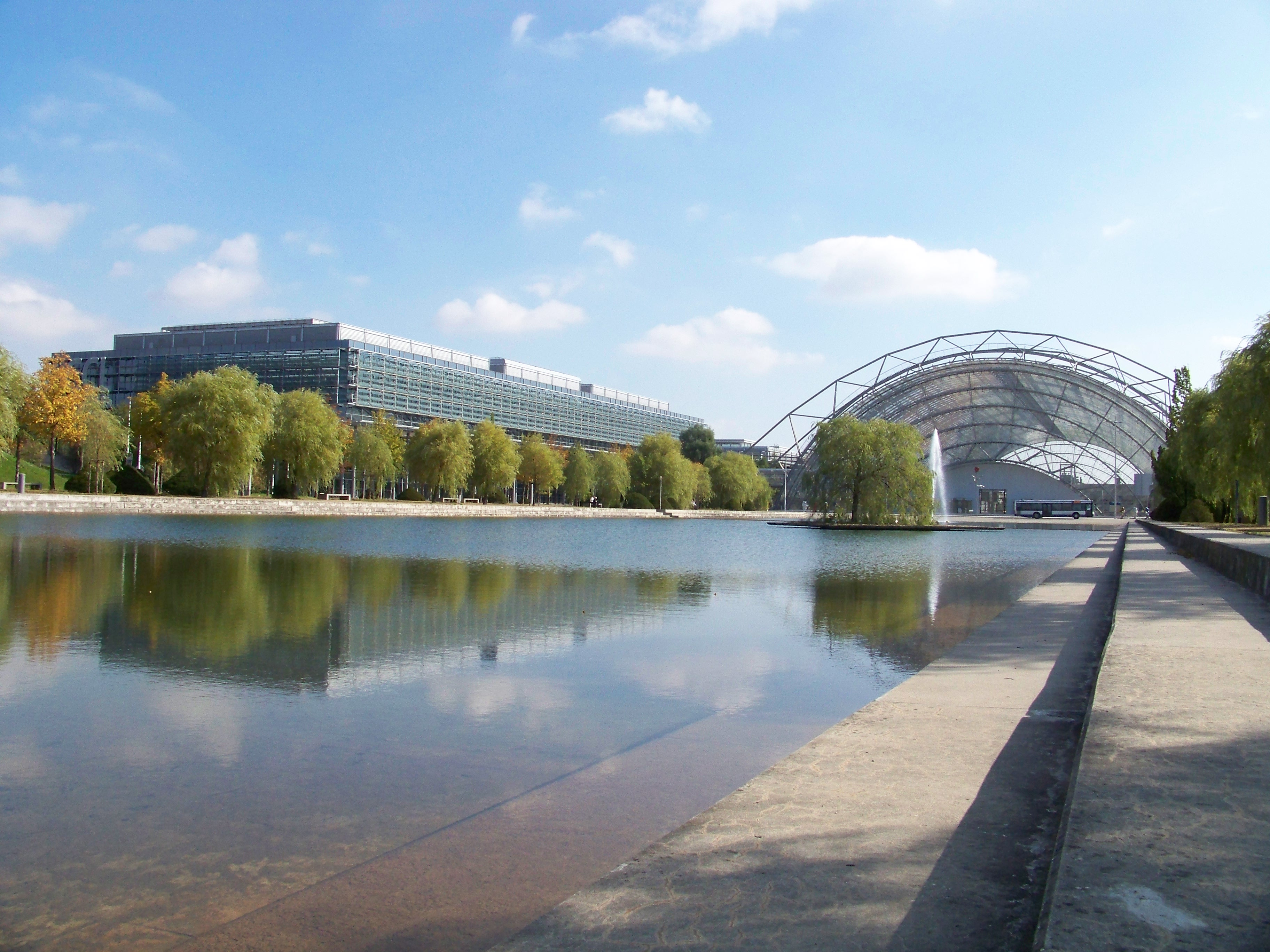 Kongresszentrum (Congress-Center Leipzig (CCL)), Glashalle und Messe-See der Leipziger Messe